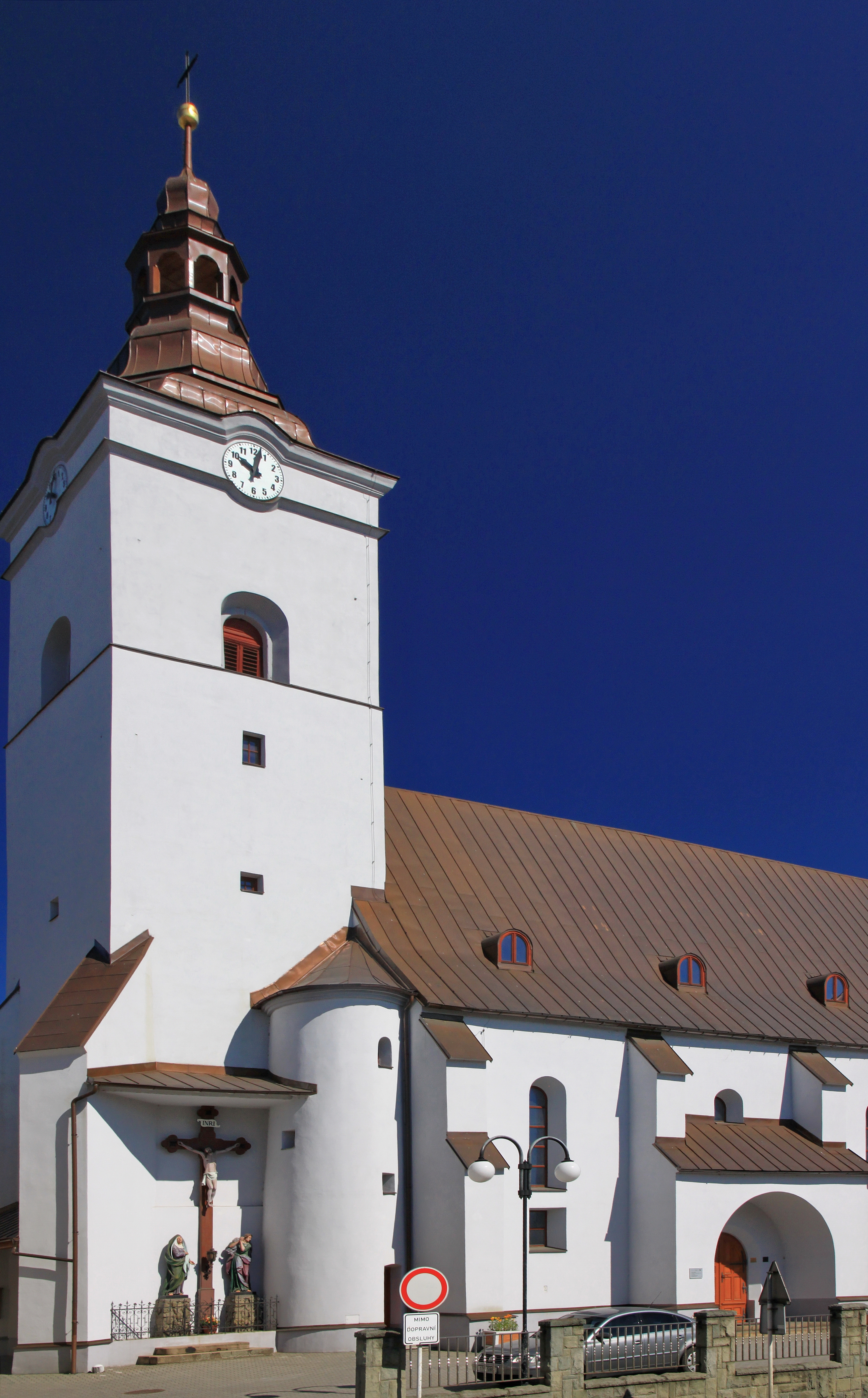 Jablunkov, kostel Božího těla, u Mariánského nám., ul. Nádražní